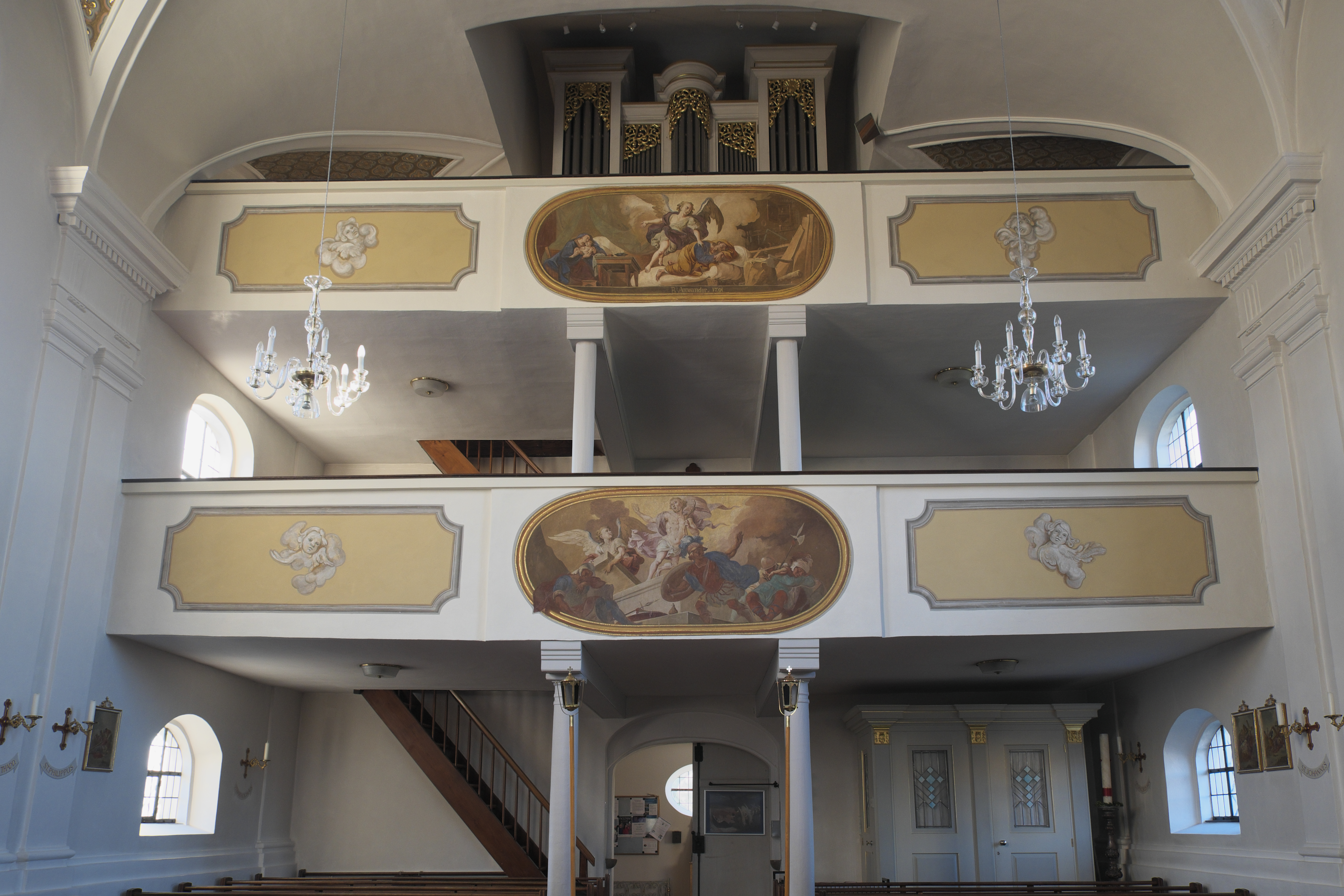 Katholische Pfarrkirche Mariä Himmelfahrt in Klingen (Aichach) im schwäbischen Landkreis Aichach-Friedberg (Bayern/Deutschland), Doppelempore mit Fresken von Johann Baptist Anwander mit Signatur und der Jahreszahl 1791: Darstellung: Traum Josefs (oben), Auferstehung Christi (unten)